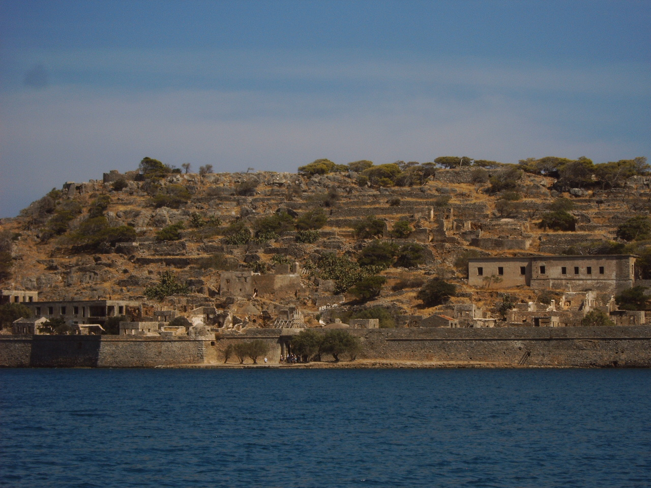 Het eiland Kalidonia (vaak aangegeven als Spinalonga, wat eigenlijk het naburige eiland is)